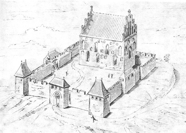 Zamek w Bezławkach - Rekonstrukcja zamku XV-wiecznego według Conrada Steinbrechta